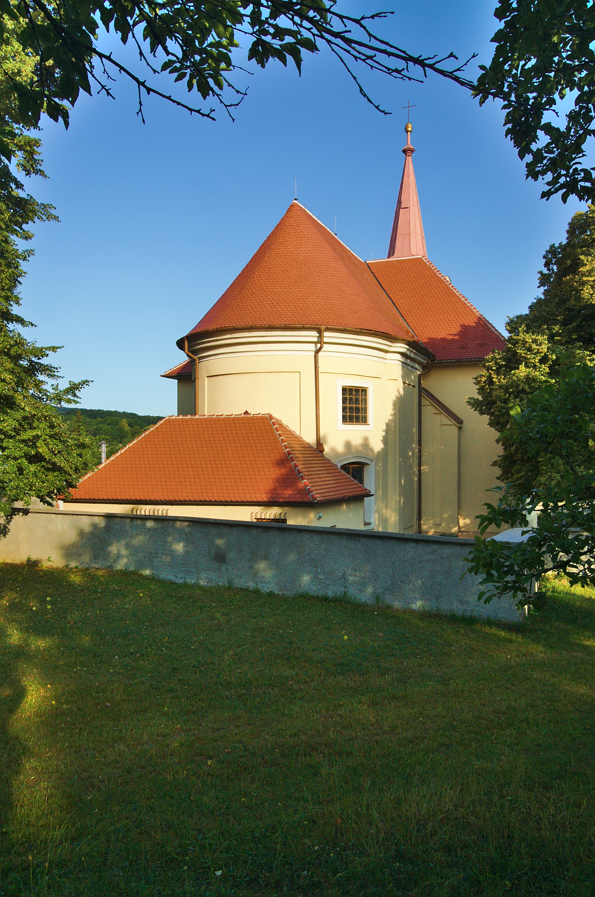 Kostel Nejsvětější Trojice, Kuželov, okres Hodonín